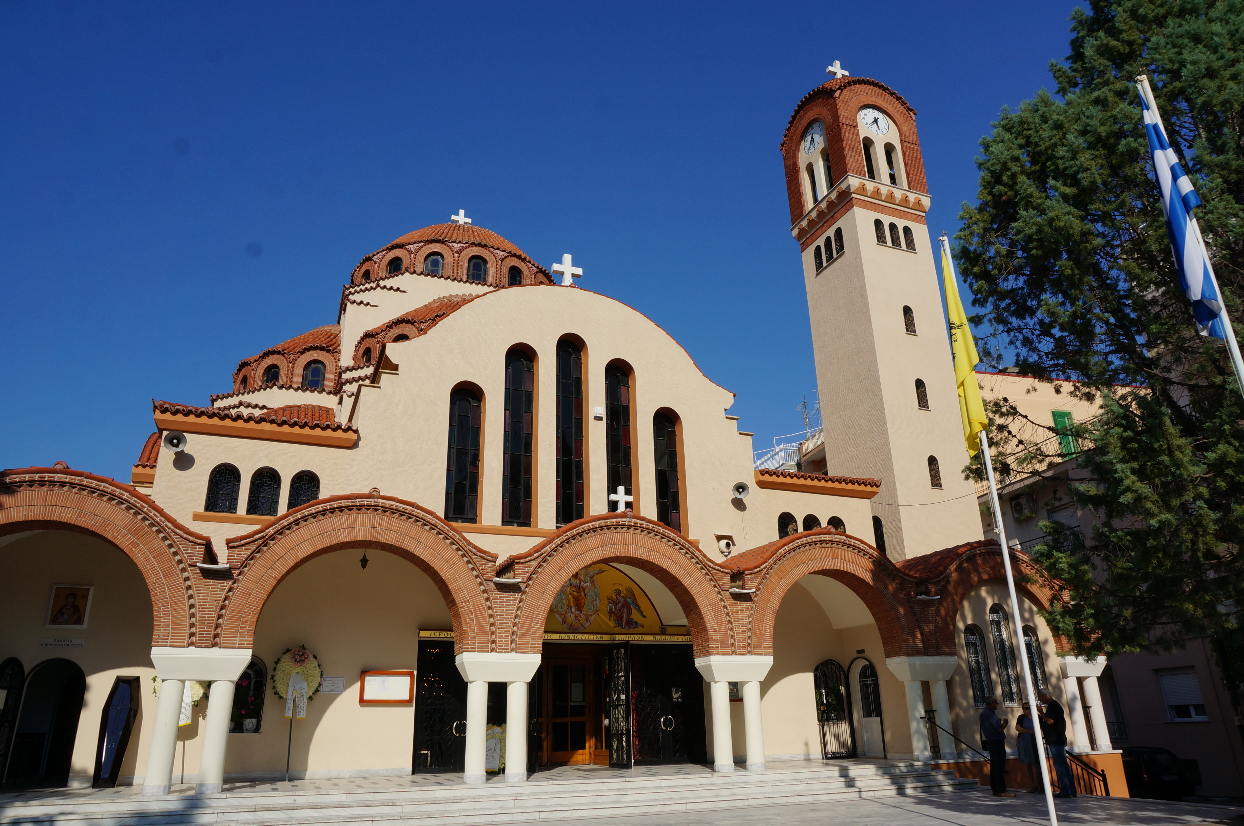 à Serres.